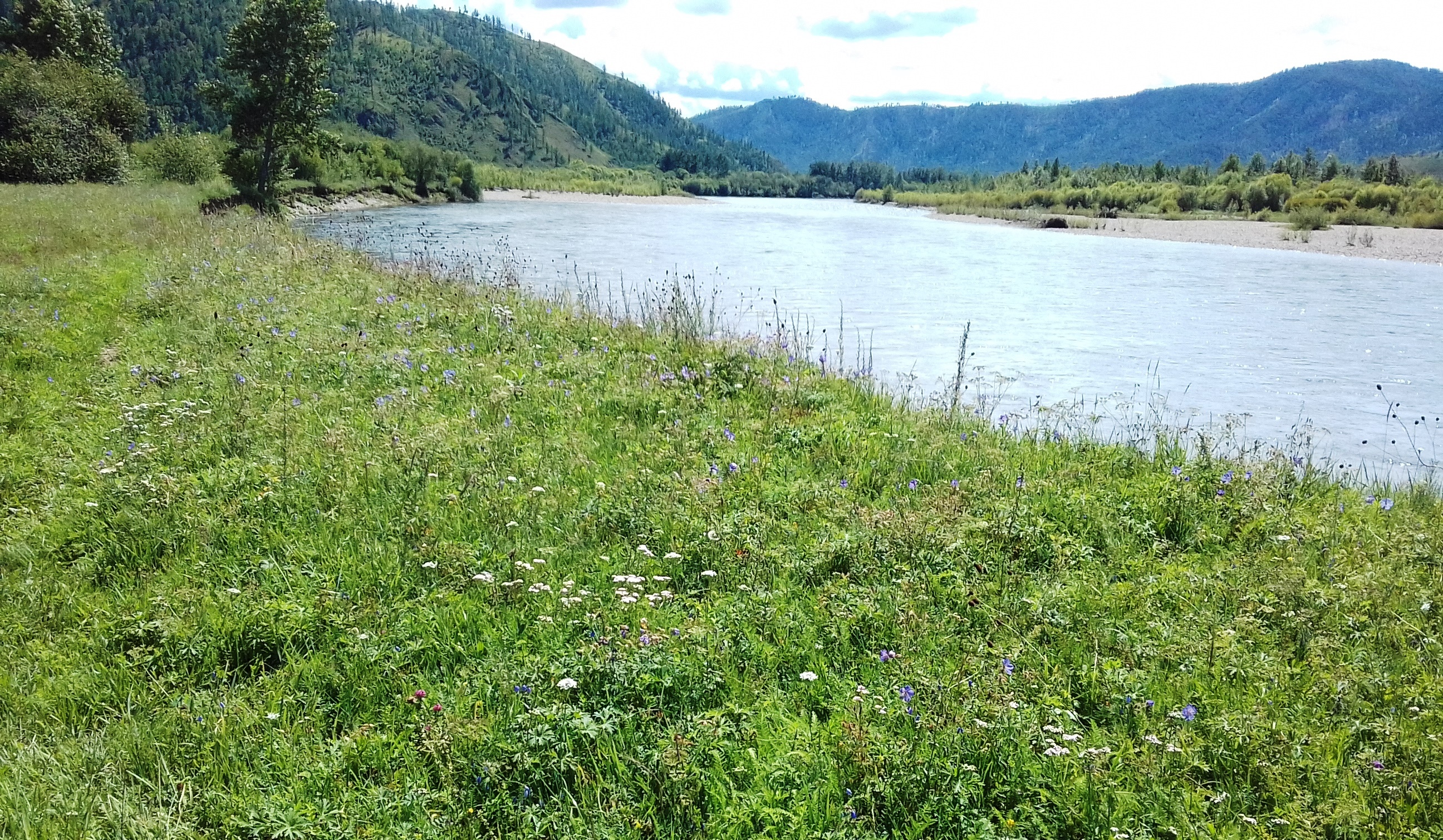 The Dzhida River in the area of Toreyskie Meadows in the Dzhidinsky District of Buryatia, Russia